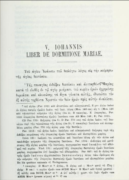 Апокриф «Святого Иоанна Богослова сказание об успении Святой Богородицы» в книге Константина Тишендорфа 1866 года.